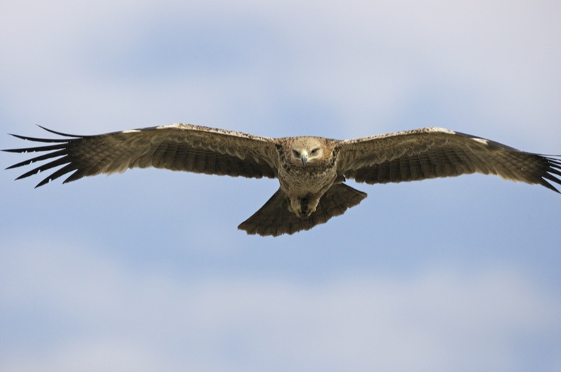 Tawny Eagle (Aquila rapax) Swahili: Tai Msasi Masai Mara, Kenya August 29, 2008